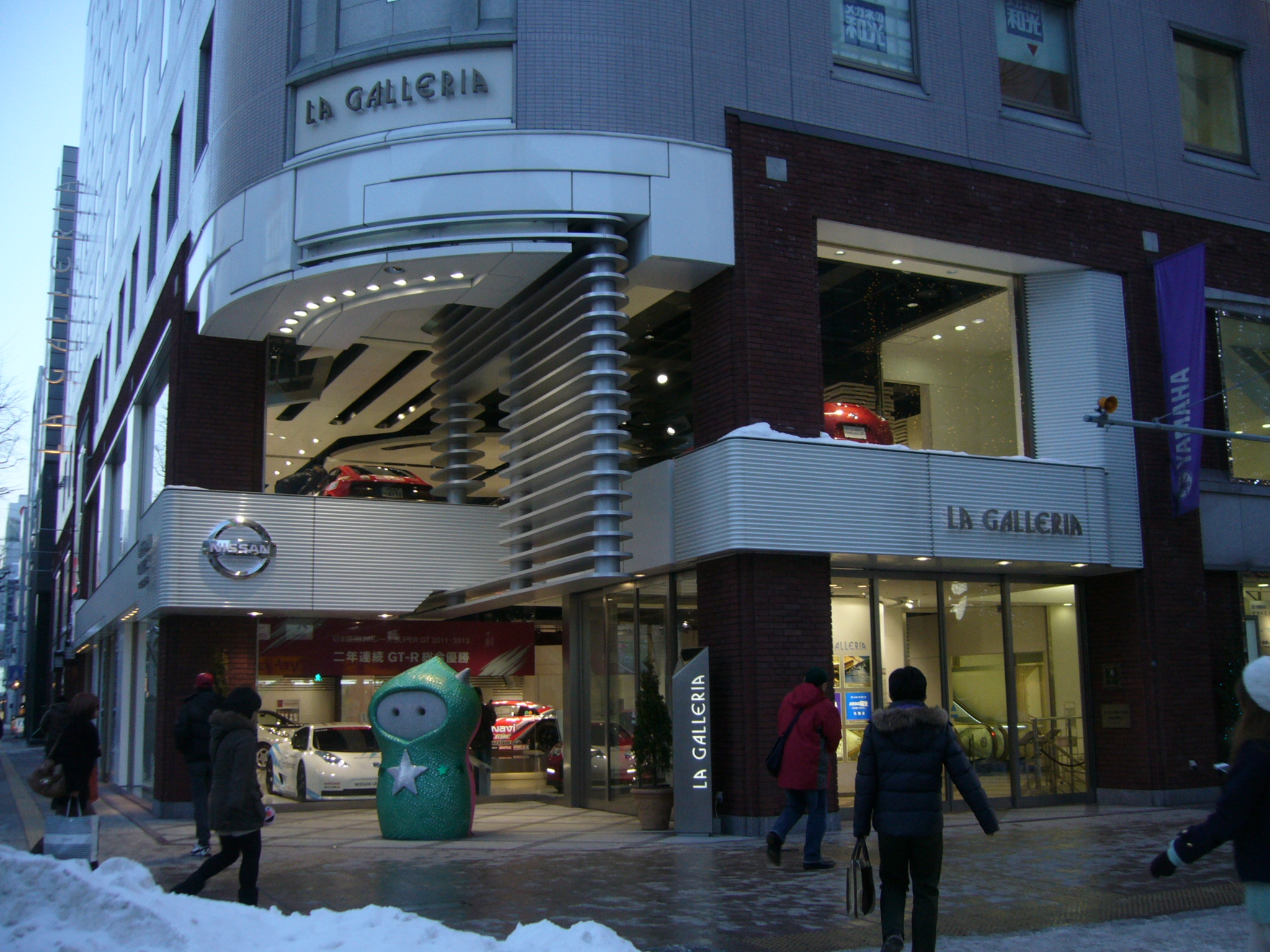 日産ギャラリー